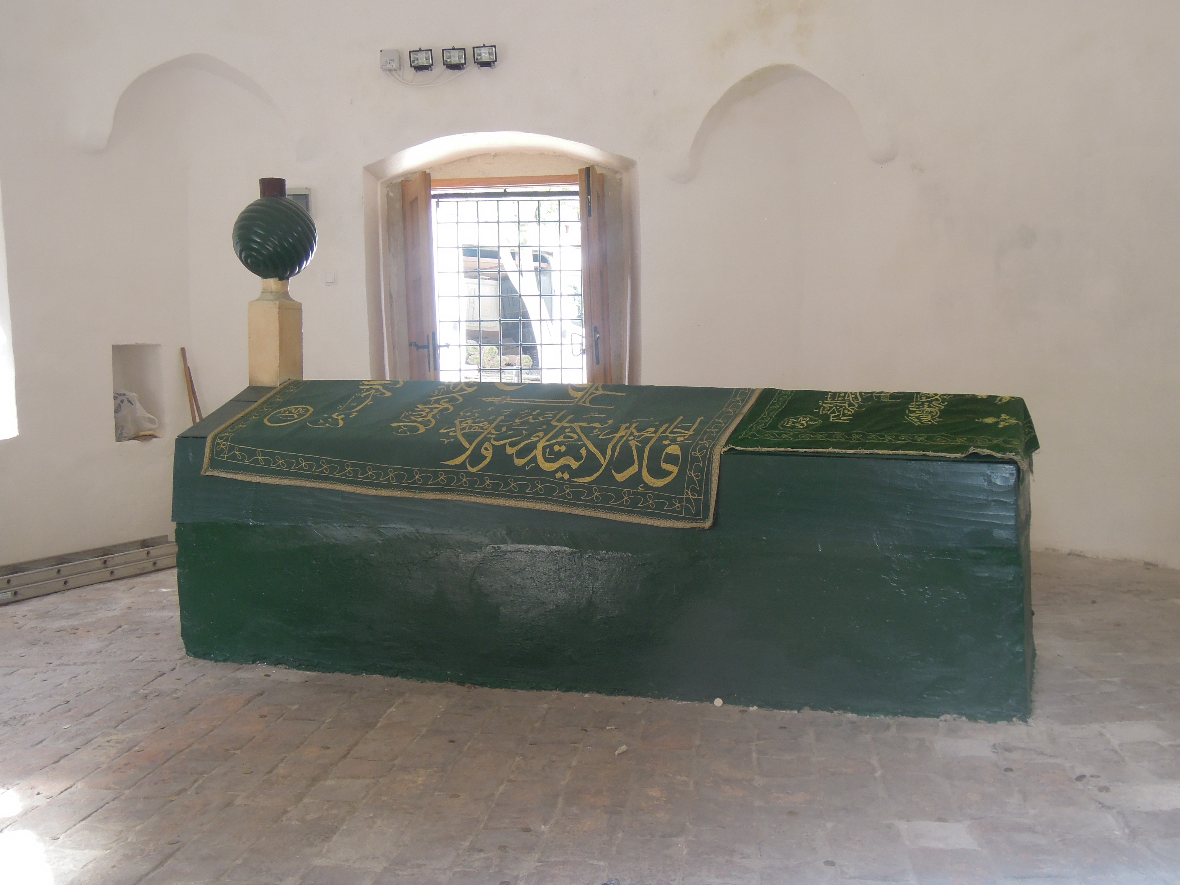 Шејх-Мустафино турбе је маузолеј у Вишњићевој улици у Београду. Подигнуто је крајем 18. века и било је у саставу текије.